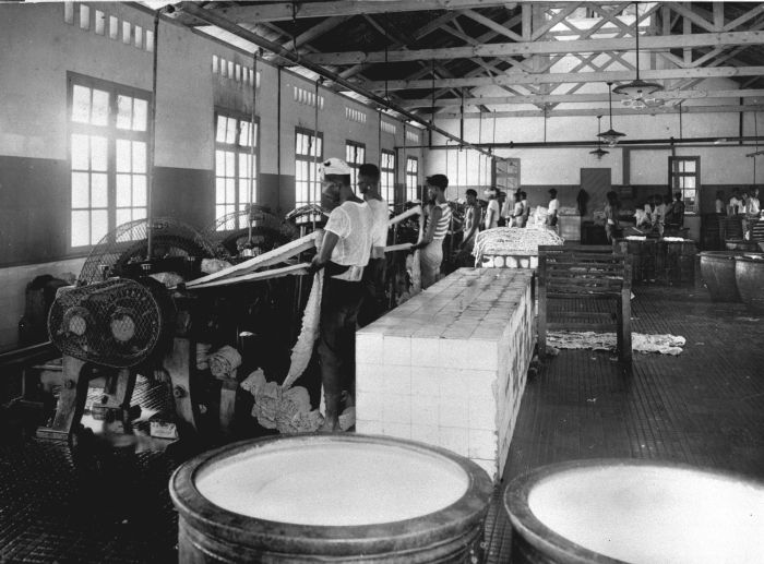 Foto. De overjarige cultures ter oostkust van Sumatra in woord en beeld. Door de A.V.R.O.S. eerbiedig opgedragen aan Z.E. den Gouverneur-Generaal van Nederlandsch-Indië Mr. D. Fock. Het uitrollen van de crêpe in een rubberfabriek Tandjong Kassau